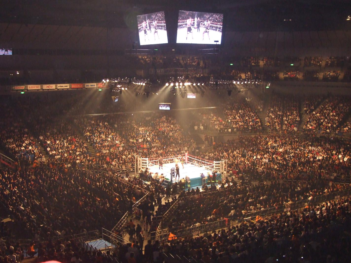 Combate final de la World GP Final 2008 entre Remy Bonjasky y Badr Hari.